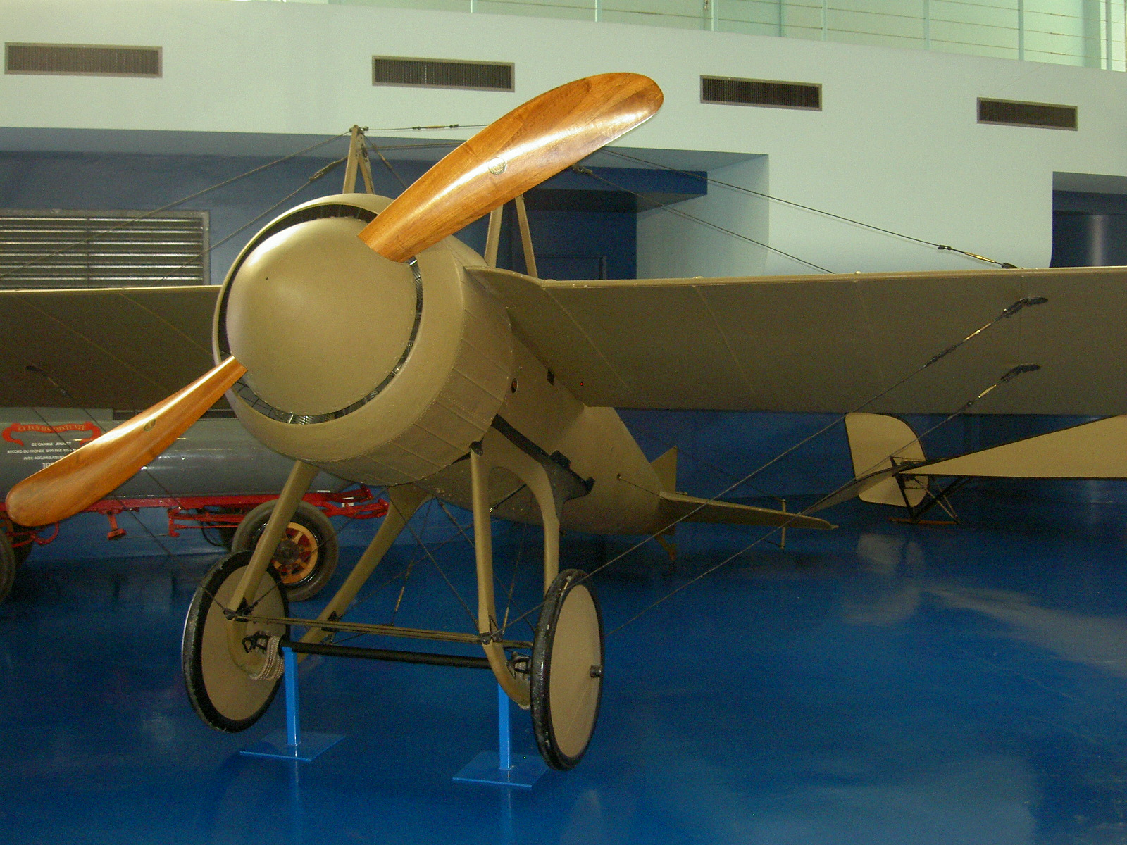 Deperdussin Monocoque (French plane)